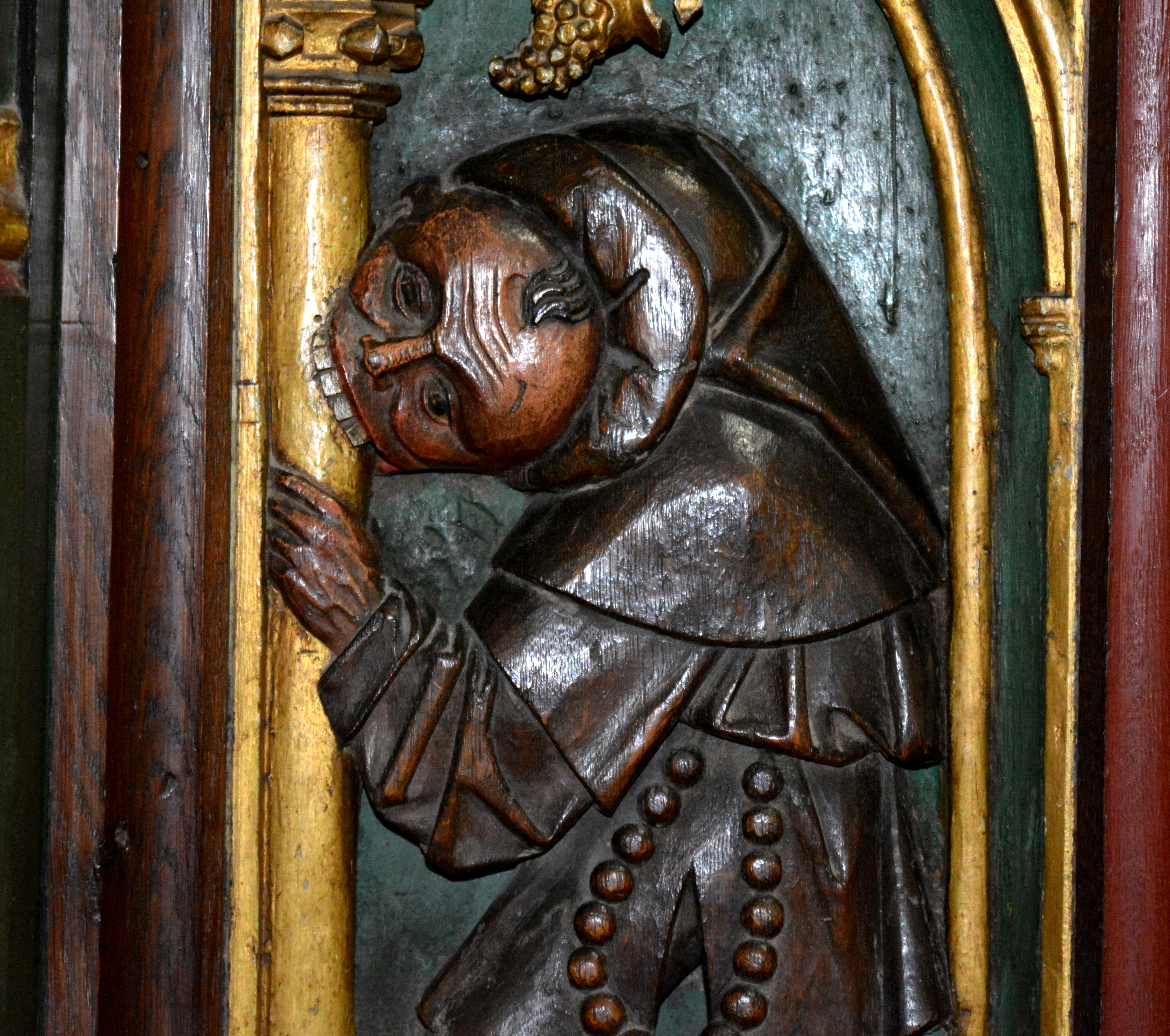 Haarlem, Grote- of Bavokerk, detail koorhek